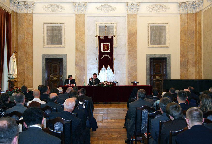 Kongres Konserwatywny